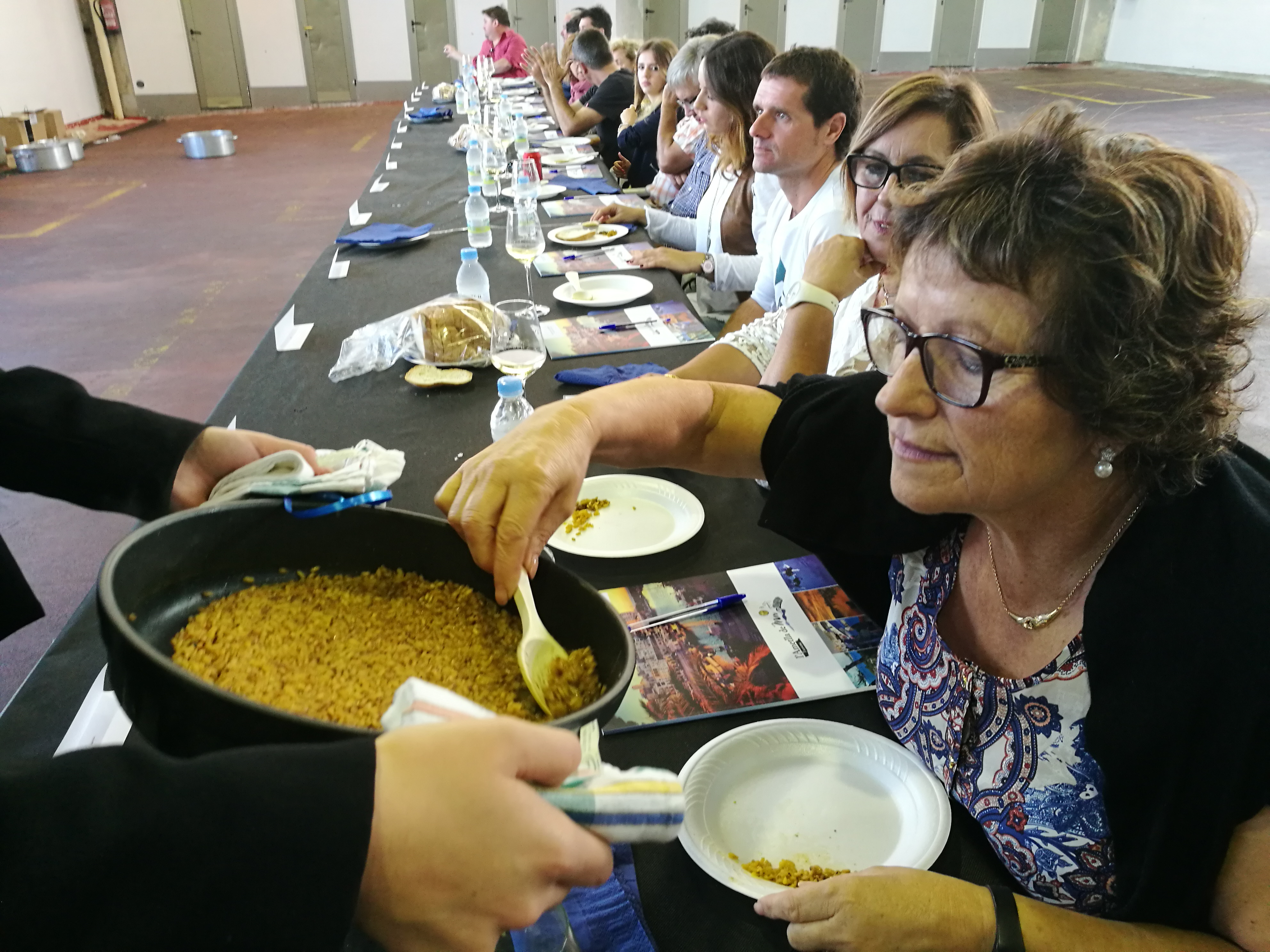 Concurs Diada de l'arrossejat